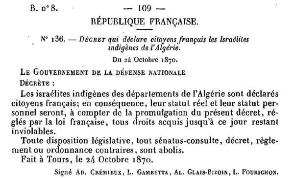 Décret Crémieux N° 136 Photocopie du Bulletin des Lois de la République Française